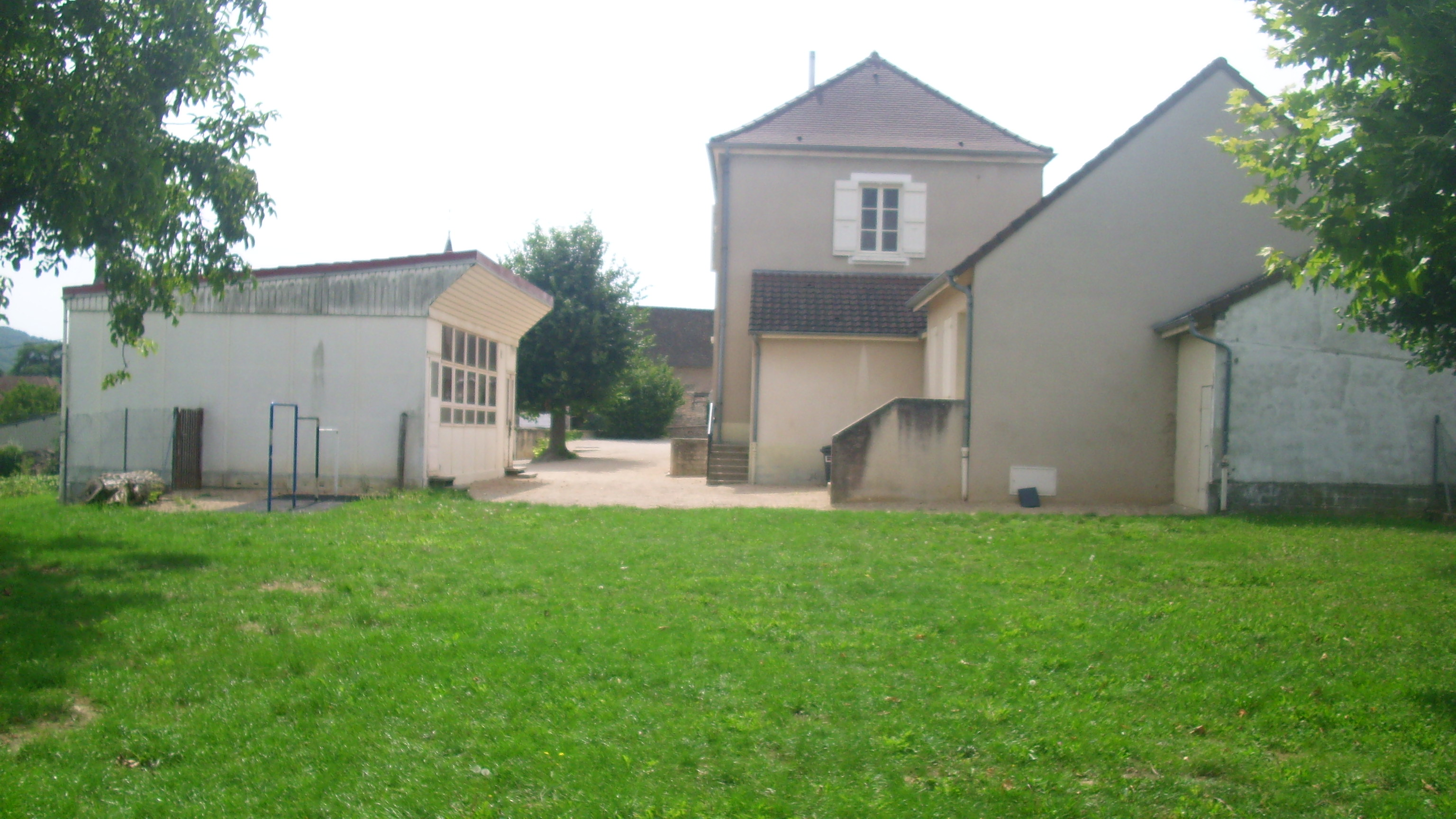 Vue de l'école et de la cantine-garderie depuis le prés.